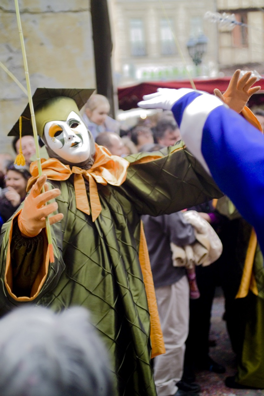 Carnaval de Limoux dans l'Aude en France